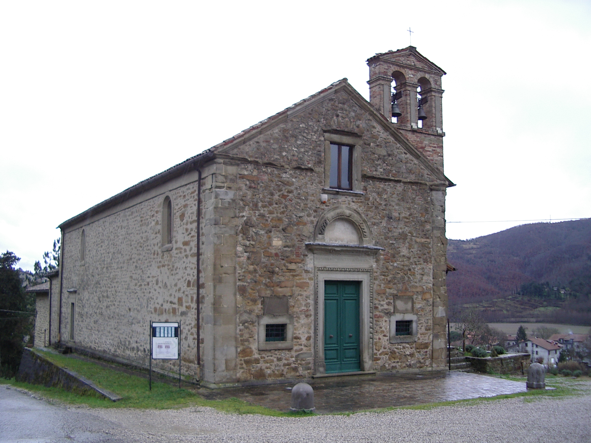 L'Oratoire Saint-Crescentino (en italien : Oratorio di San Crescentino) est un édifice religieux sité à Morra, frazione de Città di Castello en Ombrie.